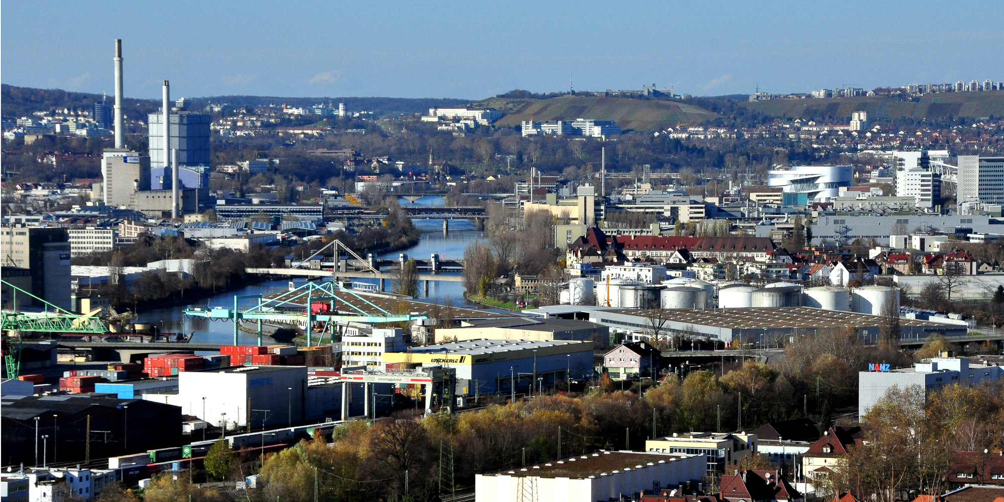 Blick über das Neckartal Richtung Westen. Im Vordergrund Obertürkheim, dahinter Untertürkheim, der Gaskessel in Stuttgart-Ost links.